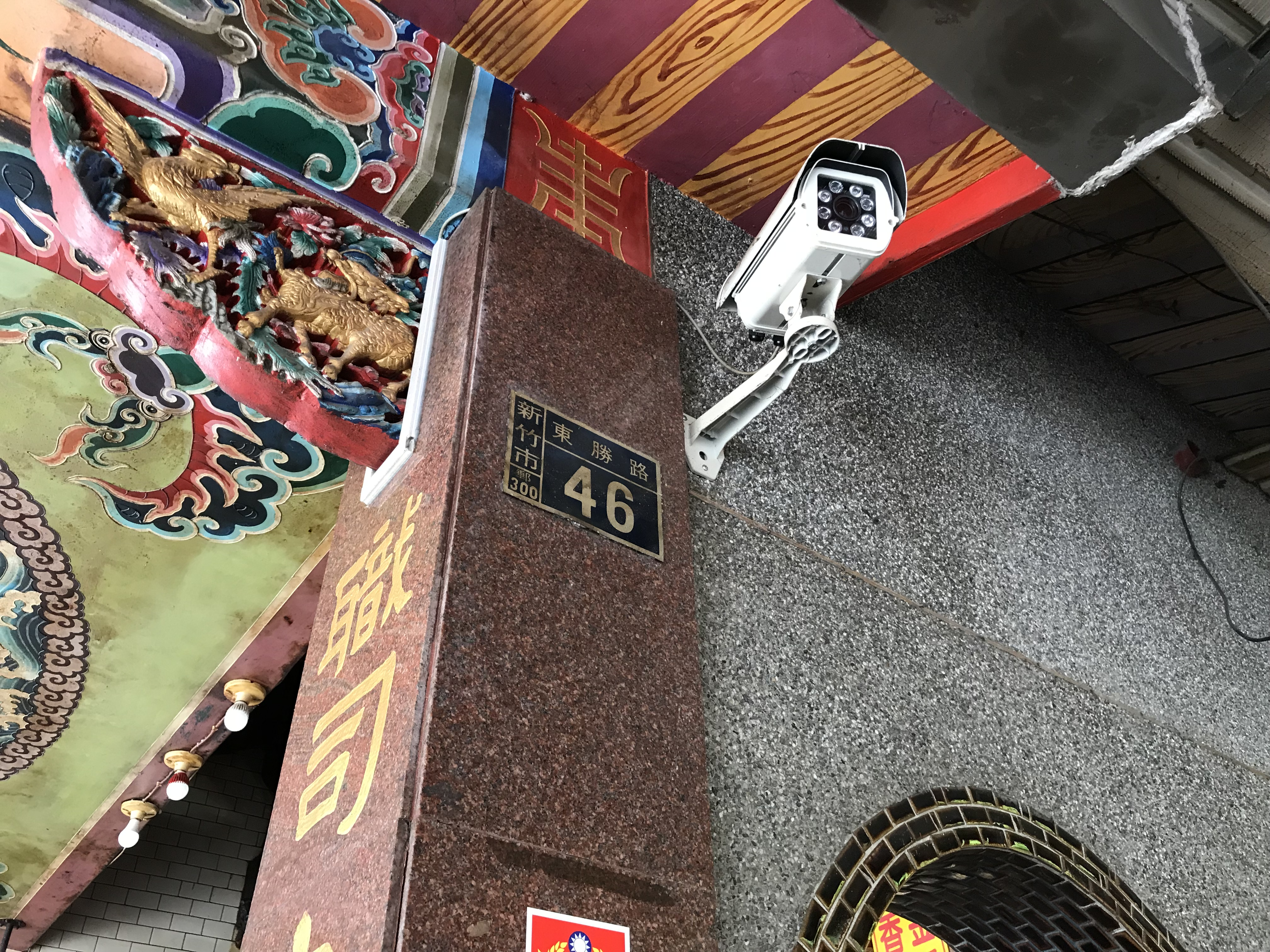 福龍山宮門牌